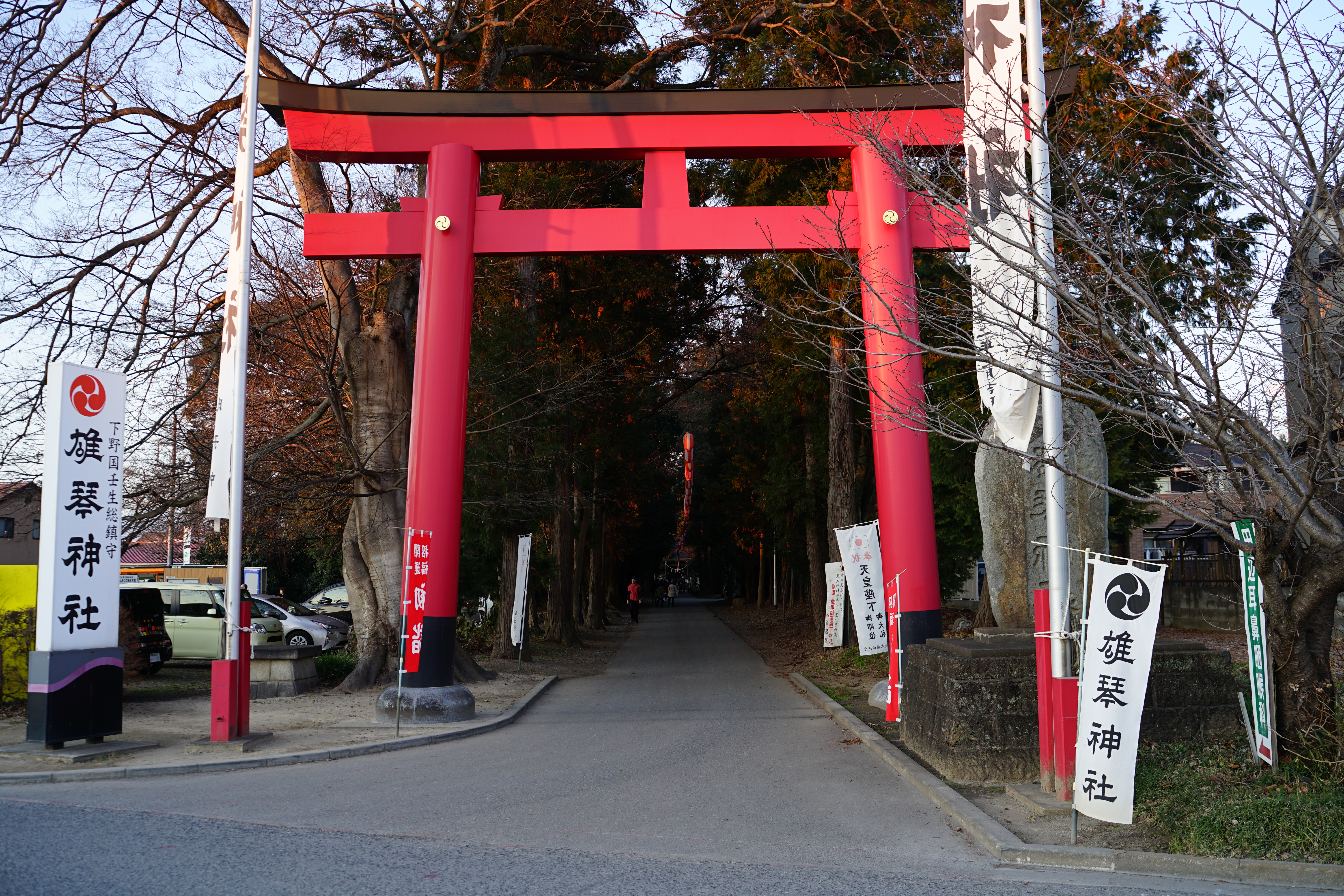 雄琴神社の一の鳥居